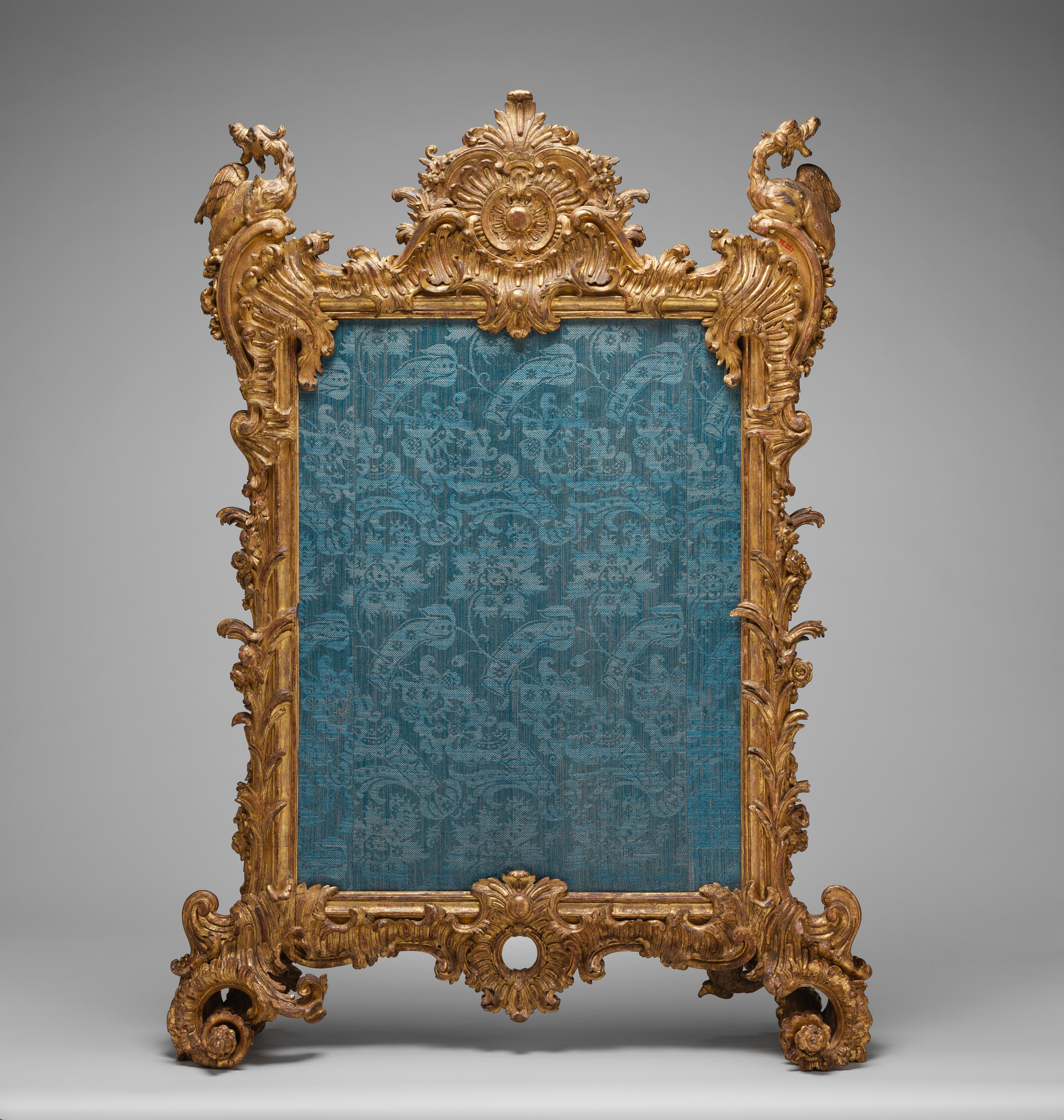 German, Würzburg; Fire screen; Woodwork-Furniture